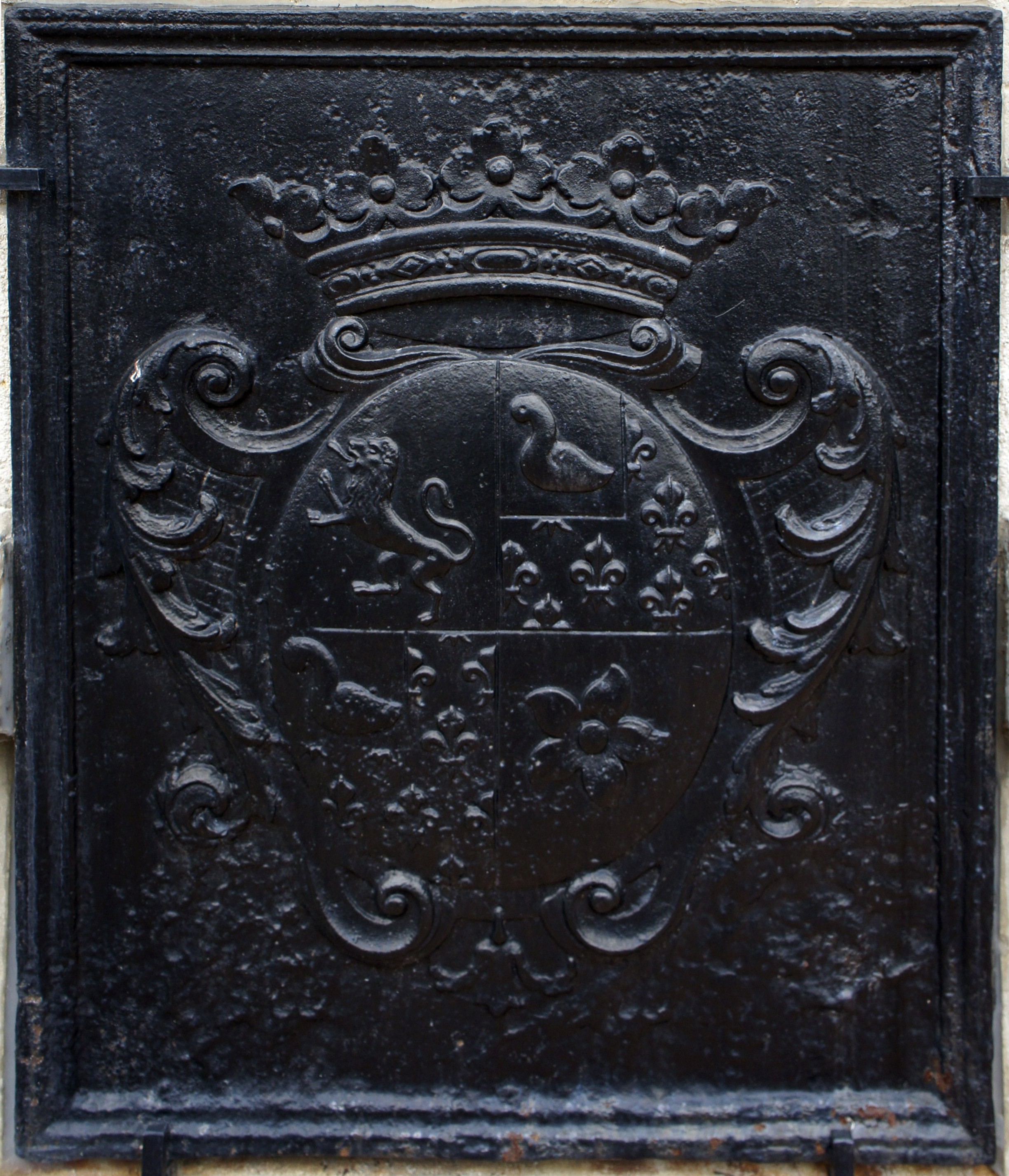 TAque sur la mairie de la ville .